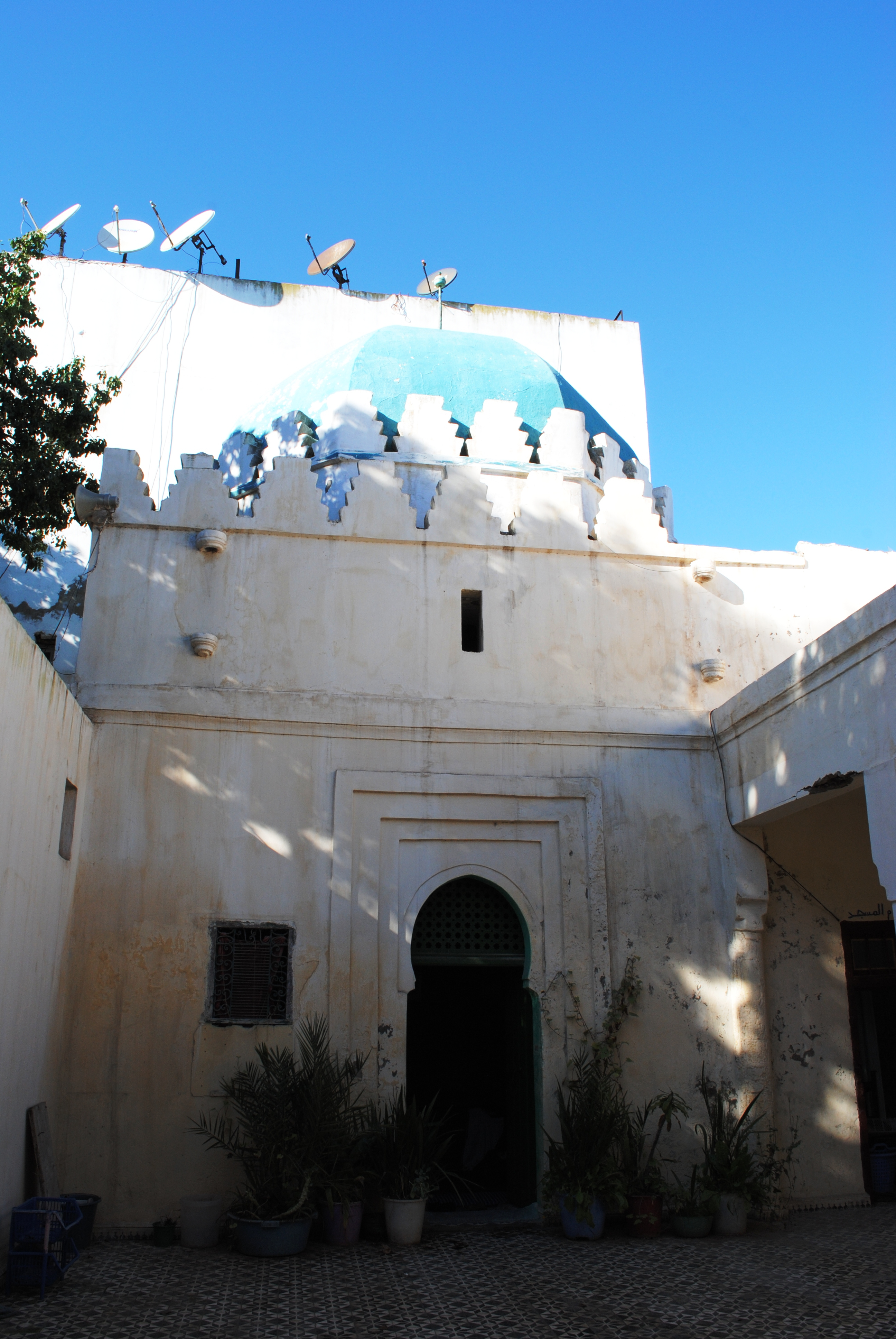 Mausolée Sidi Allal al Kairaouani